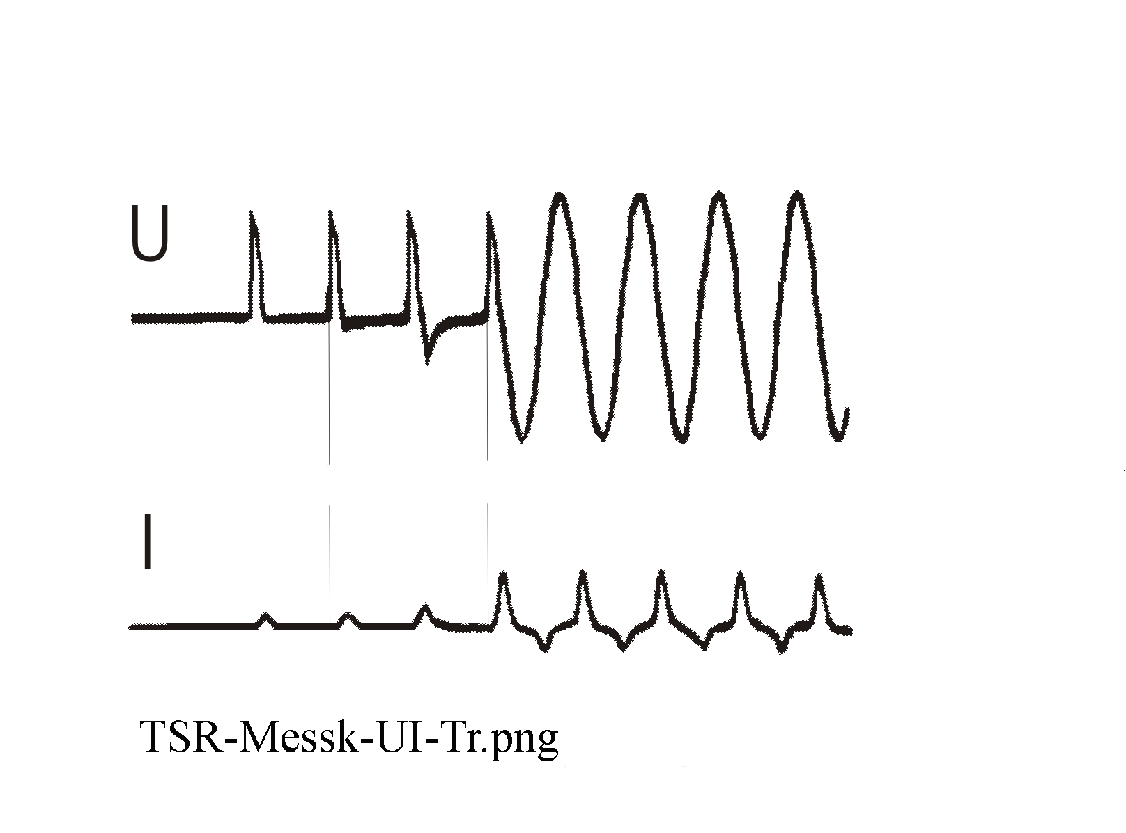 Trafoschaltrelais,TSR, Einschaltverfahren